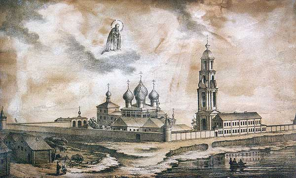 Беларуская (тарашкевіца): малюнак, краявід Спаса-Прэабражэнскага Генадзева манастыра ў XIX стагодзьдзі